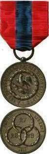 Médaille de Juillet